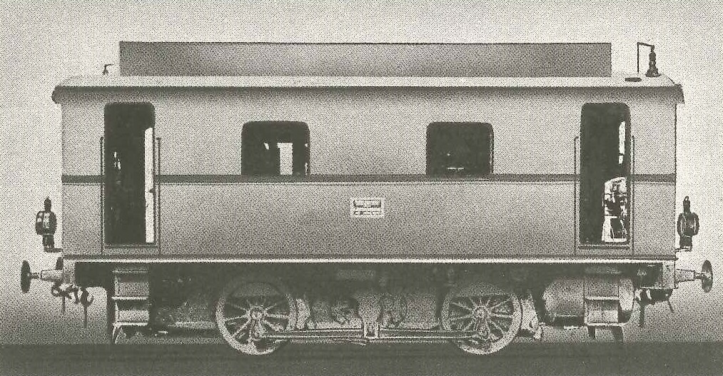 Foto der Schwarzkopff-Huwiler-Lokomotive auf der Ausstellung in Seddin